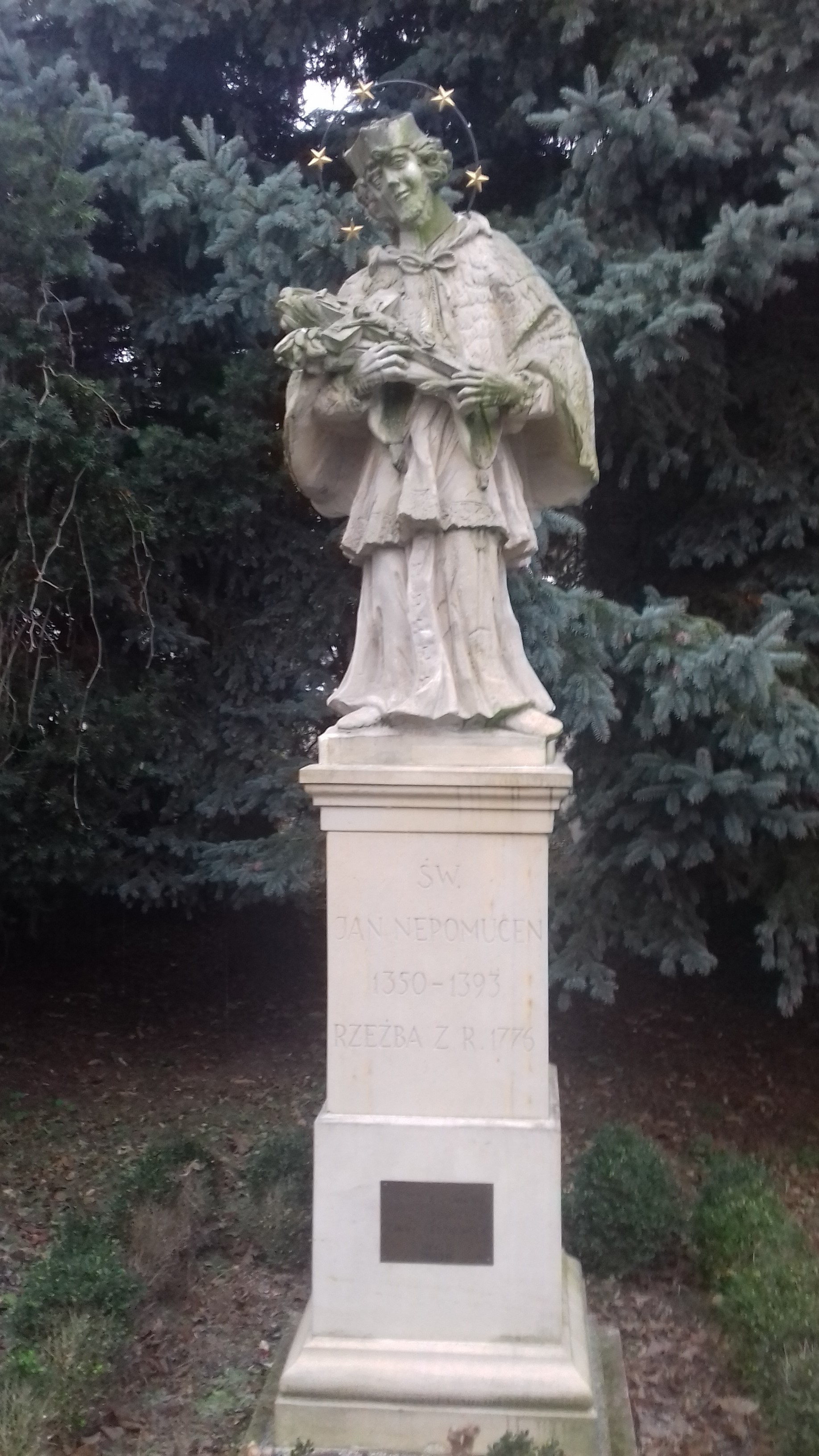 Lesznowola (gm. Lesznowola, pow. Piaseczno) - figura Św. Jana Nepomucena